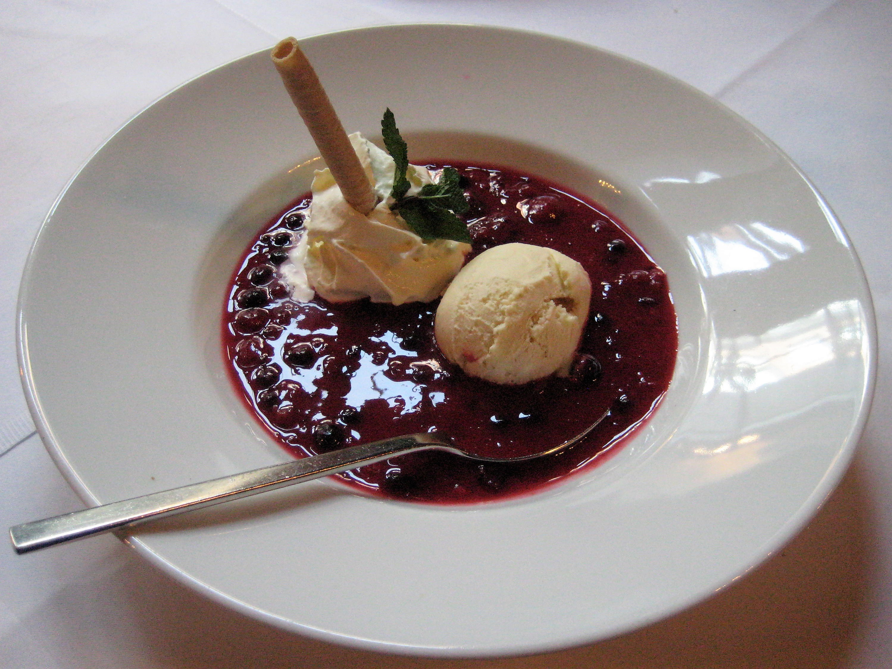 Bremer Rote Grütze, serviert mit Vanilleeiskugel und Schlagsahne.Hier im Restaurant „StadtWirt“ in Bremen-Altstadt.